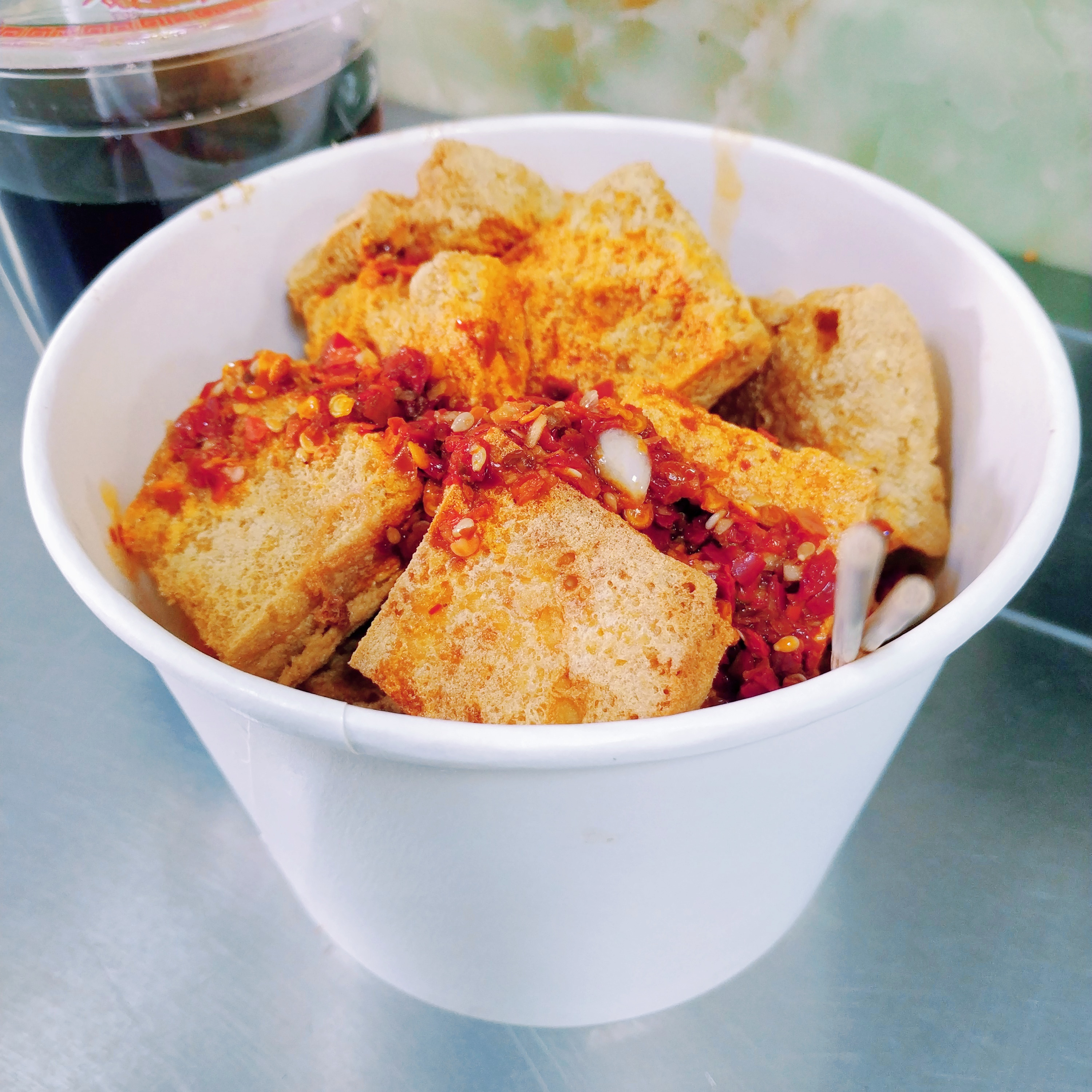 中文（中国大陆）: 西镇臭豆腐